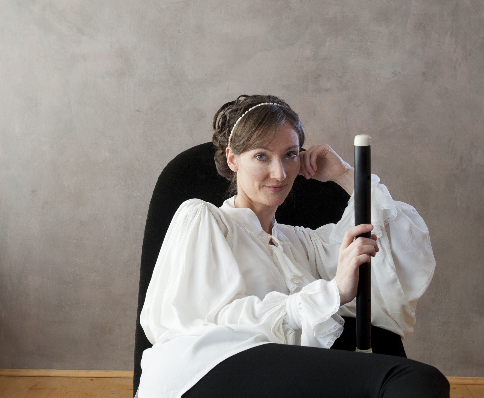 Jana Semerádová, flétnistka